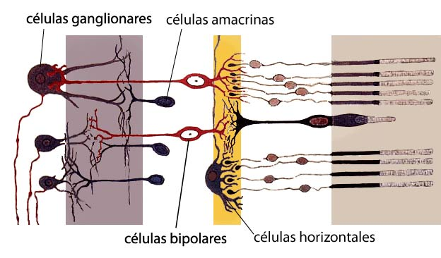 Esquema de la estructura de la retina